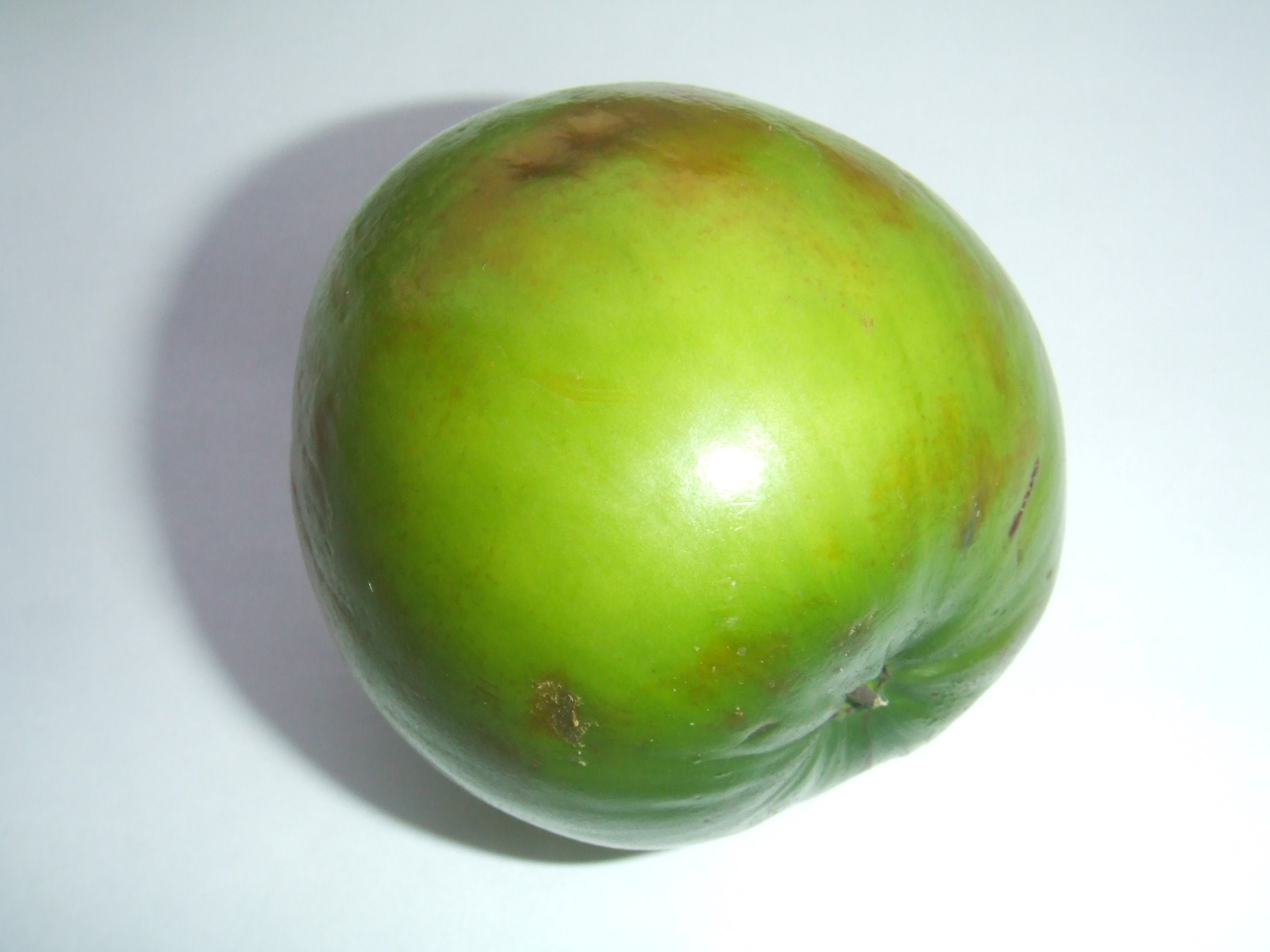 Ziziphus zizyphus, Jujube, gekocht op de Binnenrotte markt in Rotterdam